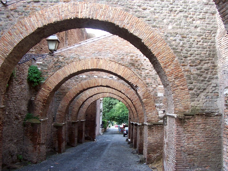 Roma - Clivio di Scauro